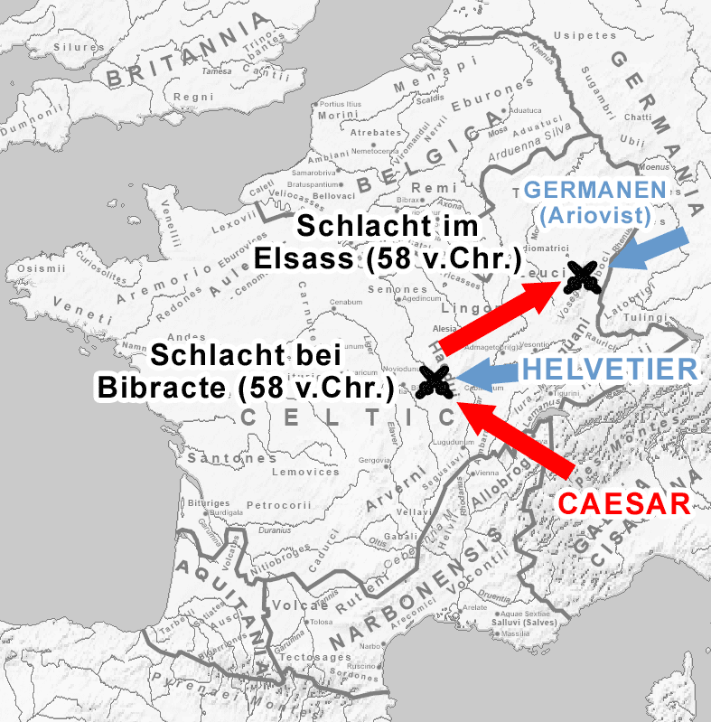 Darstellung des Gallischen Krieges - 1. Buch "De bello Gallico".